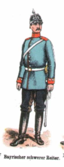 Bavarian Cavalry